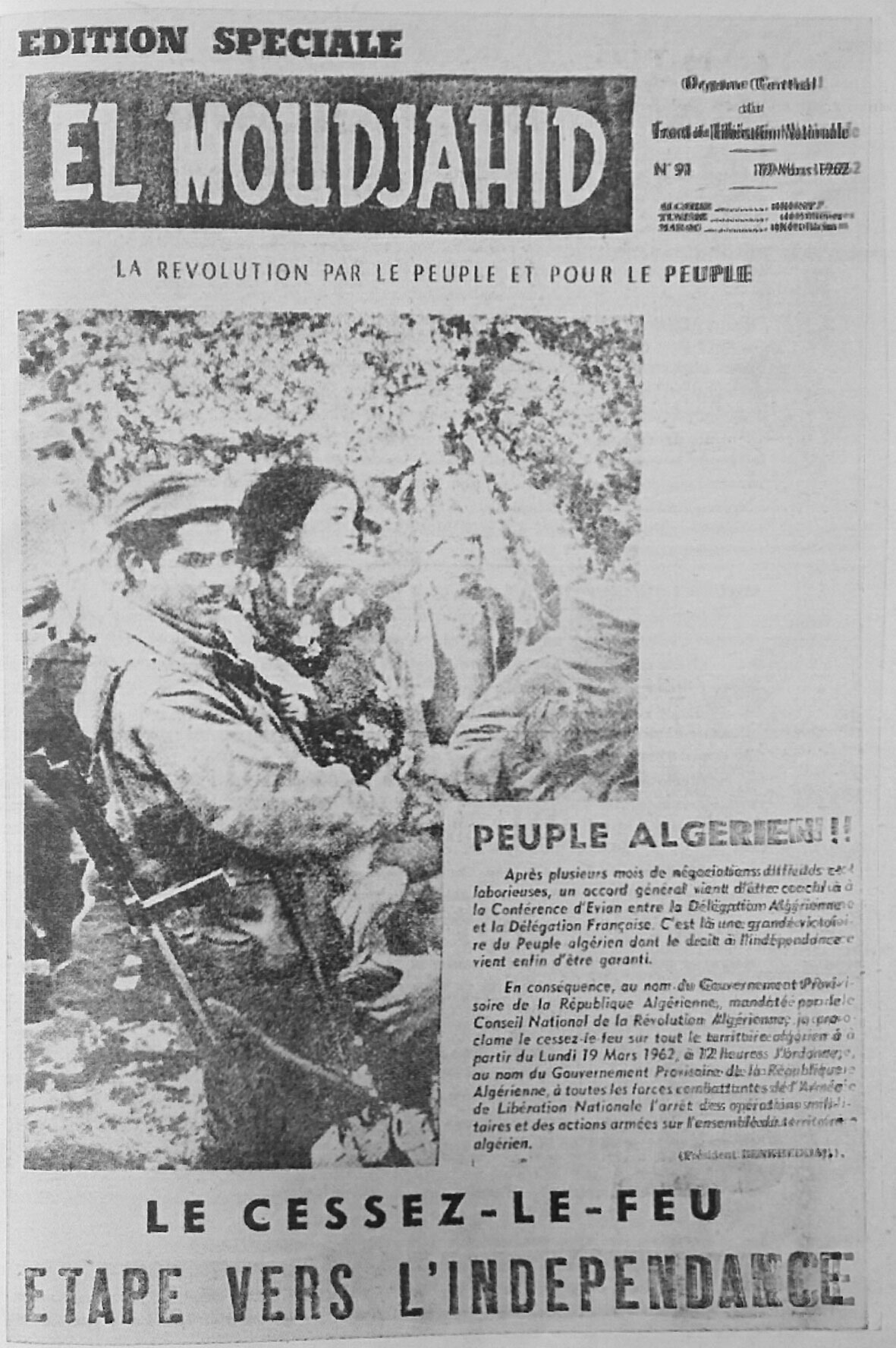 El Moudjahid Fr [91] - 19-13-1962 - Cessez-le-feu - Etape vers l'indépendance